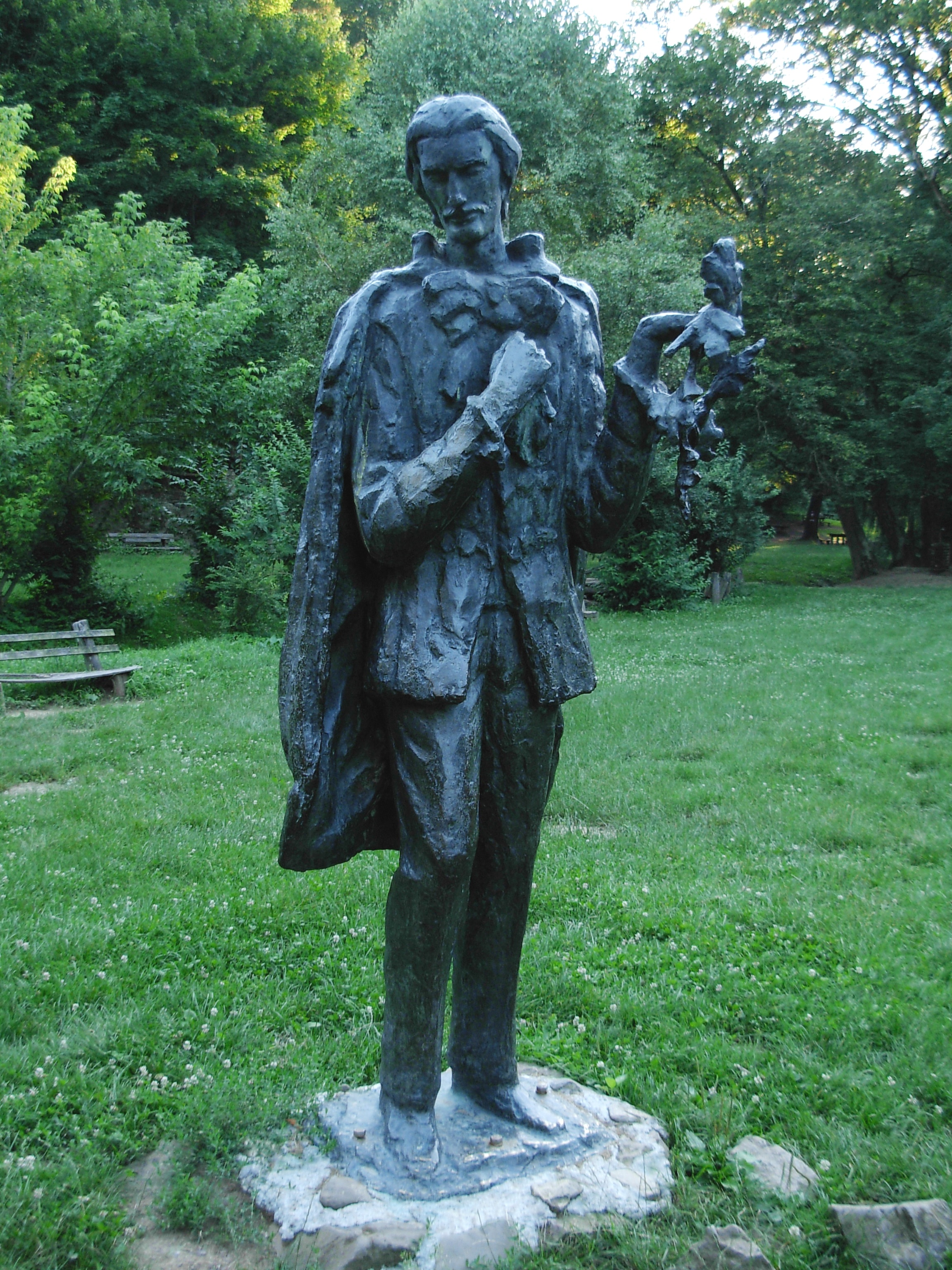 Statua Branka Radičevića na Stražilovu.